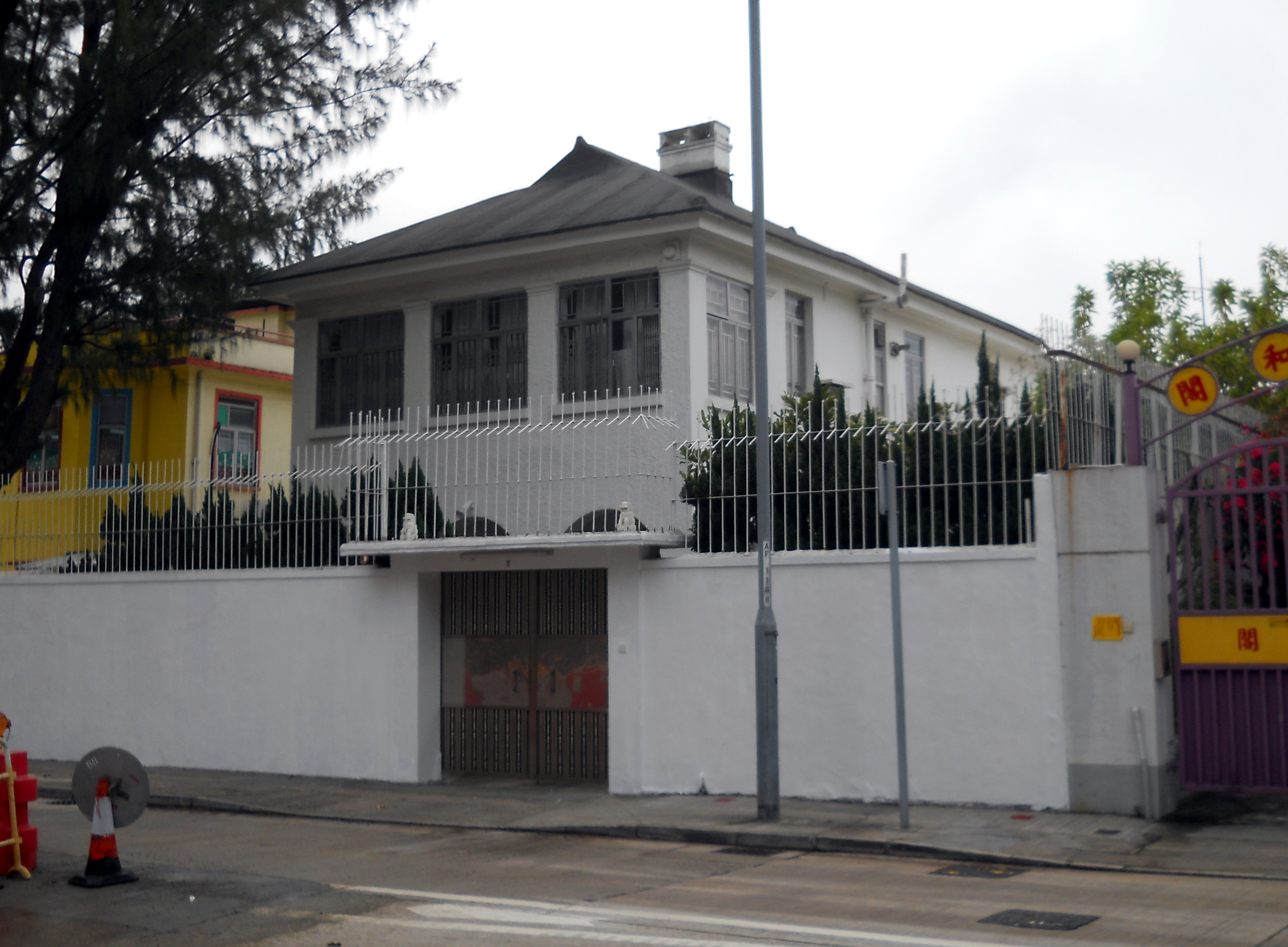 中文（香港）: 羅福道7號